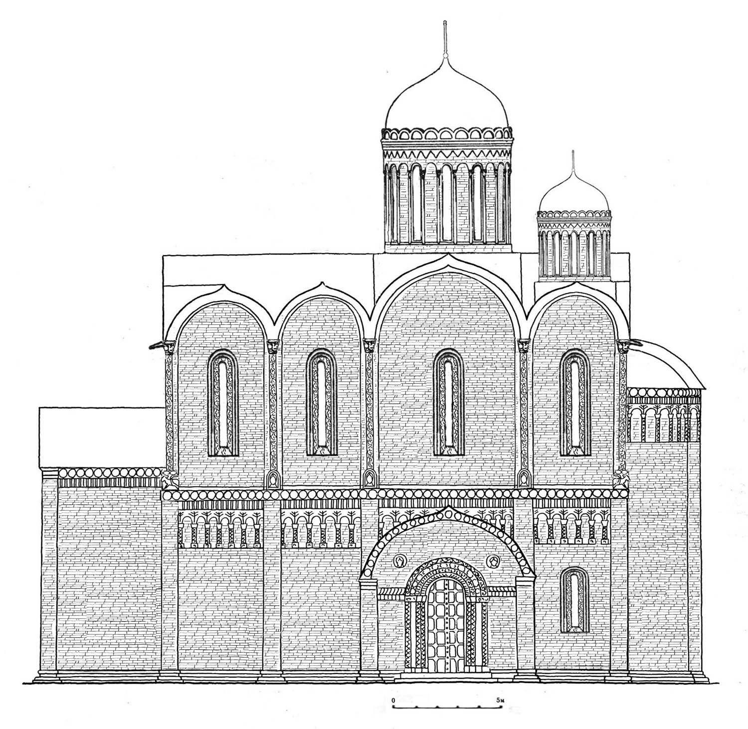 Dr. Sergey Zagraevsky permitted to use in Wikipedia his scientific works on the conditions of free licenses, permission # 2009062810038434.